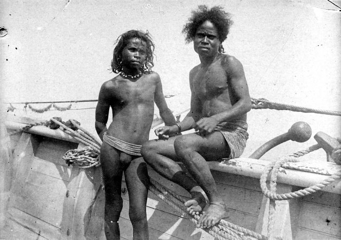 Repronegatief. Molukkers van het eiland Penamboelai, een van de Aroe-eilanden